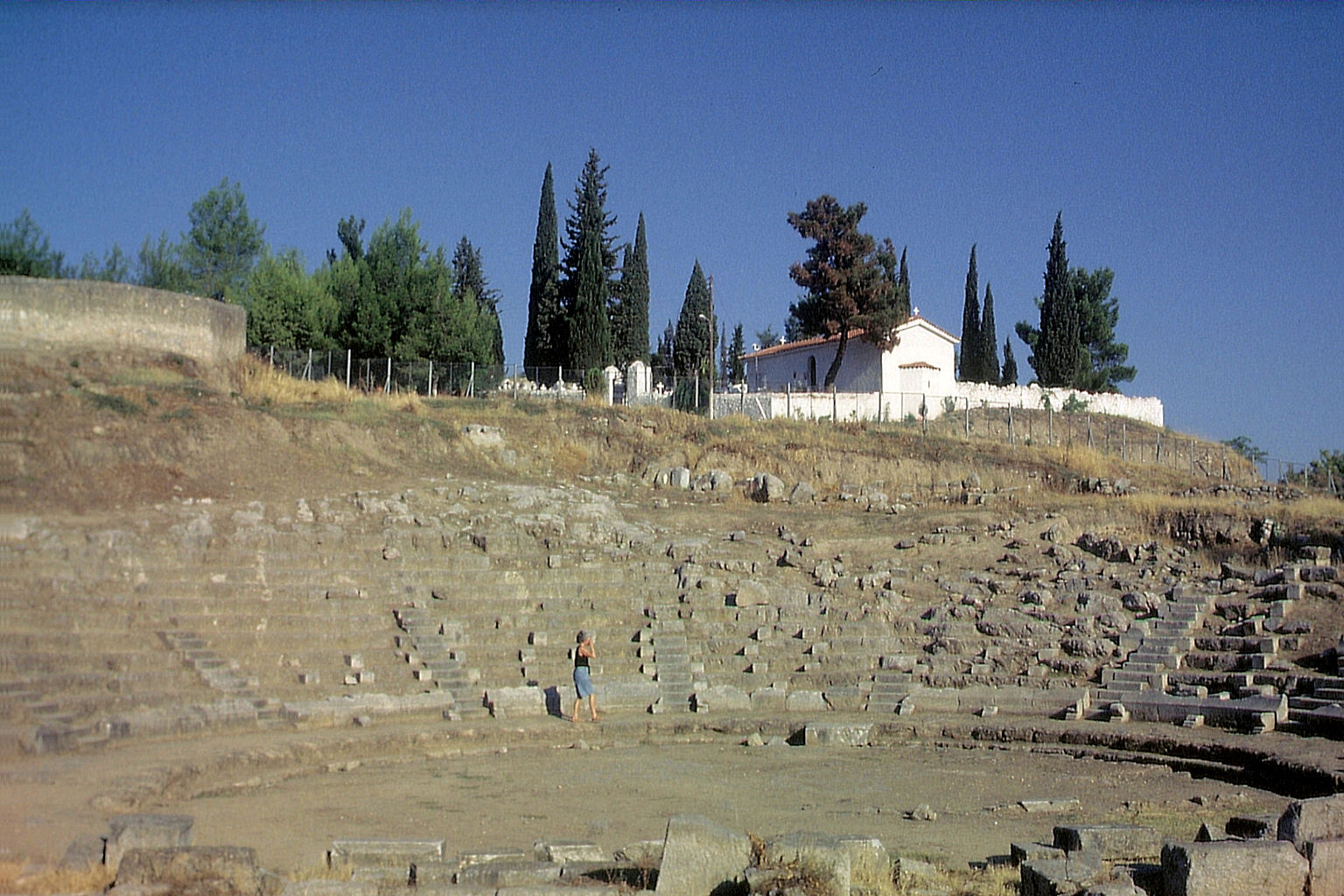 Amphitheater von Orchomenos aus dem 4. Jahrhundert v. Chr.